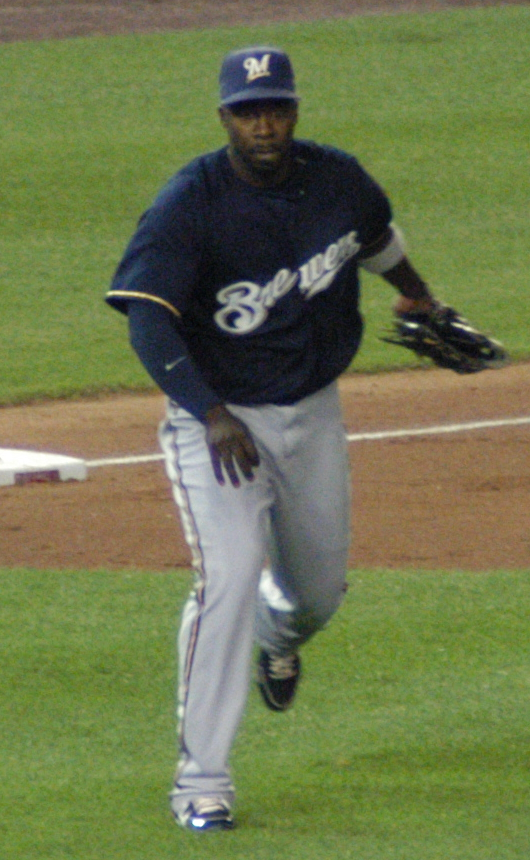 Bill Hall